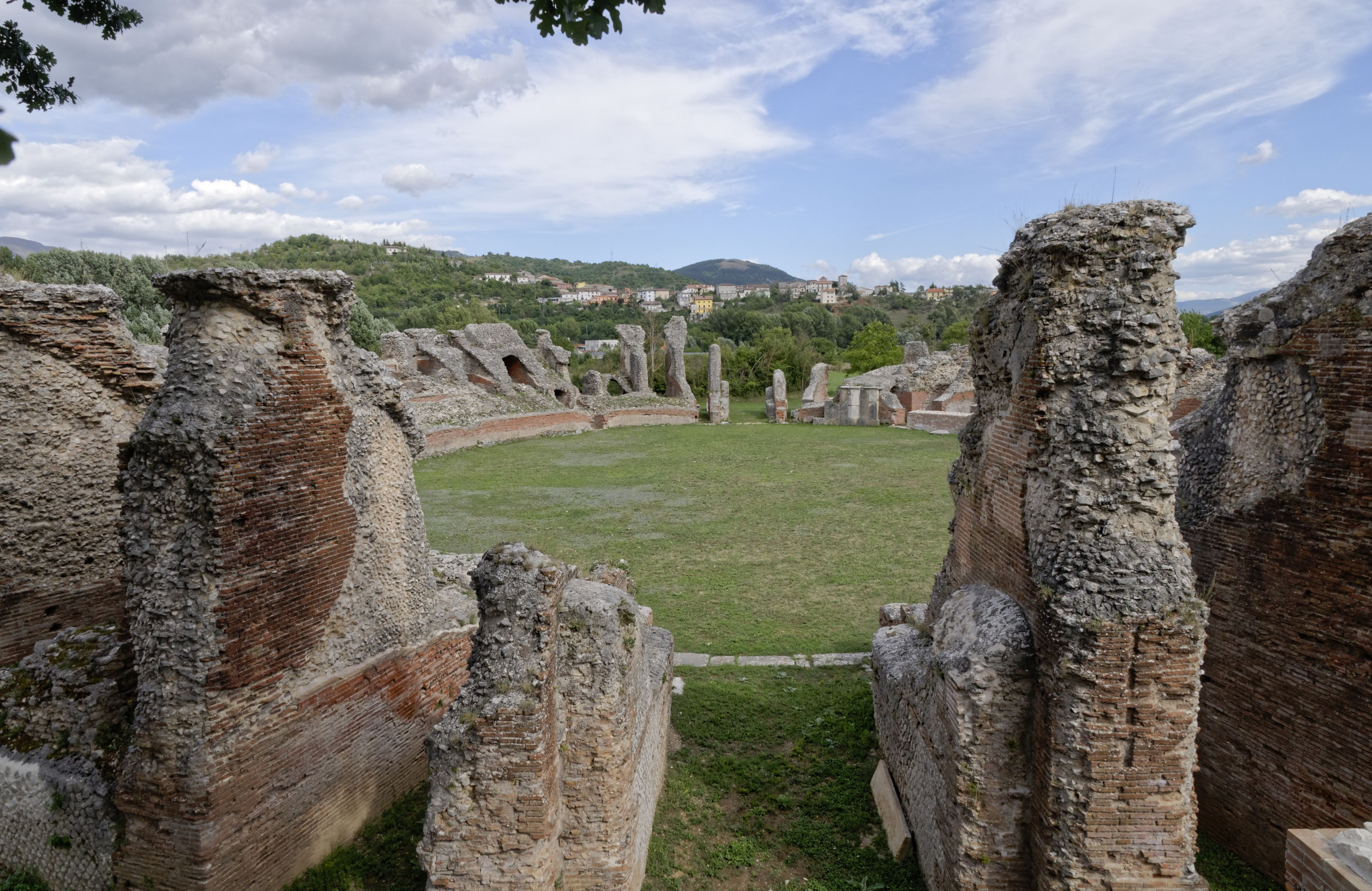 Amiternum 2015